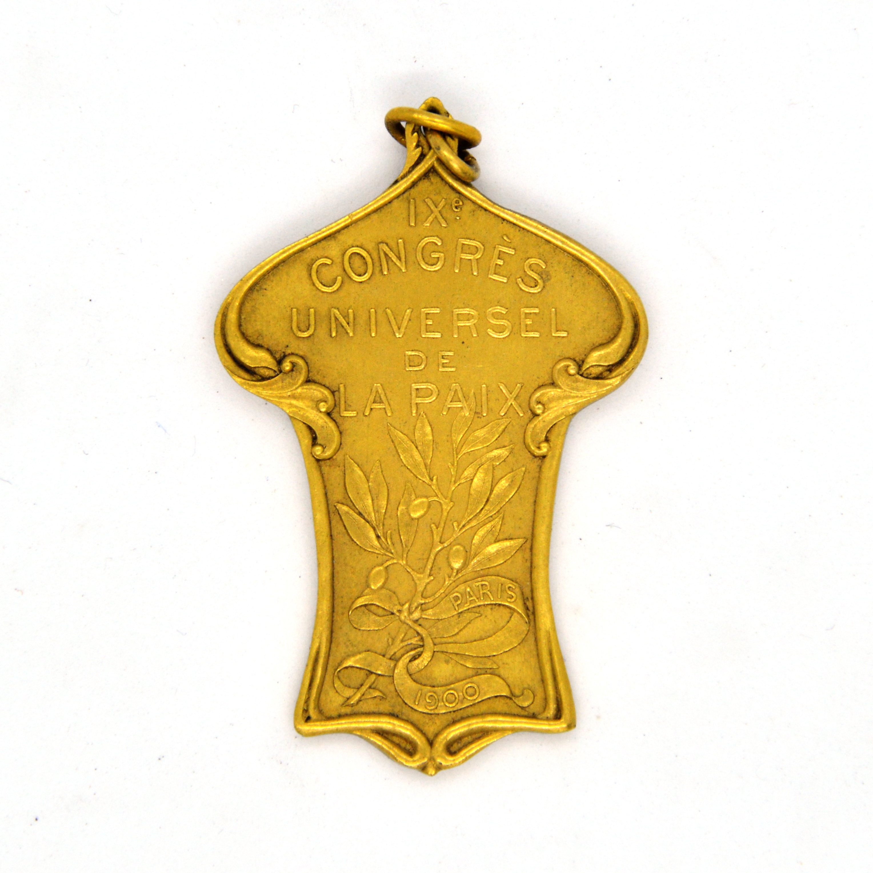 médaillon avec inscription célébrant le IX congrès Universel de la paix, Paris 1900 et figurant une branche d'olivier rameau d'olivier This photo of movable heritage has been taken in the Walloon Region